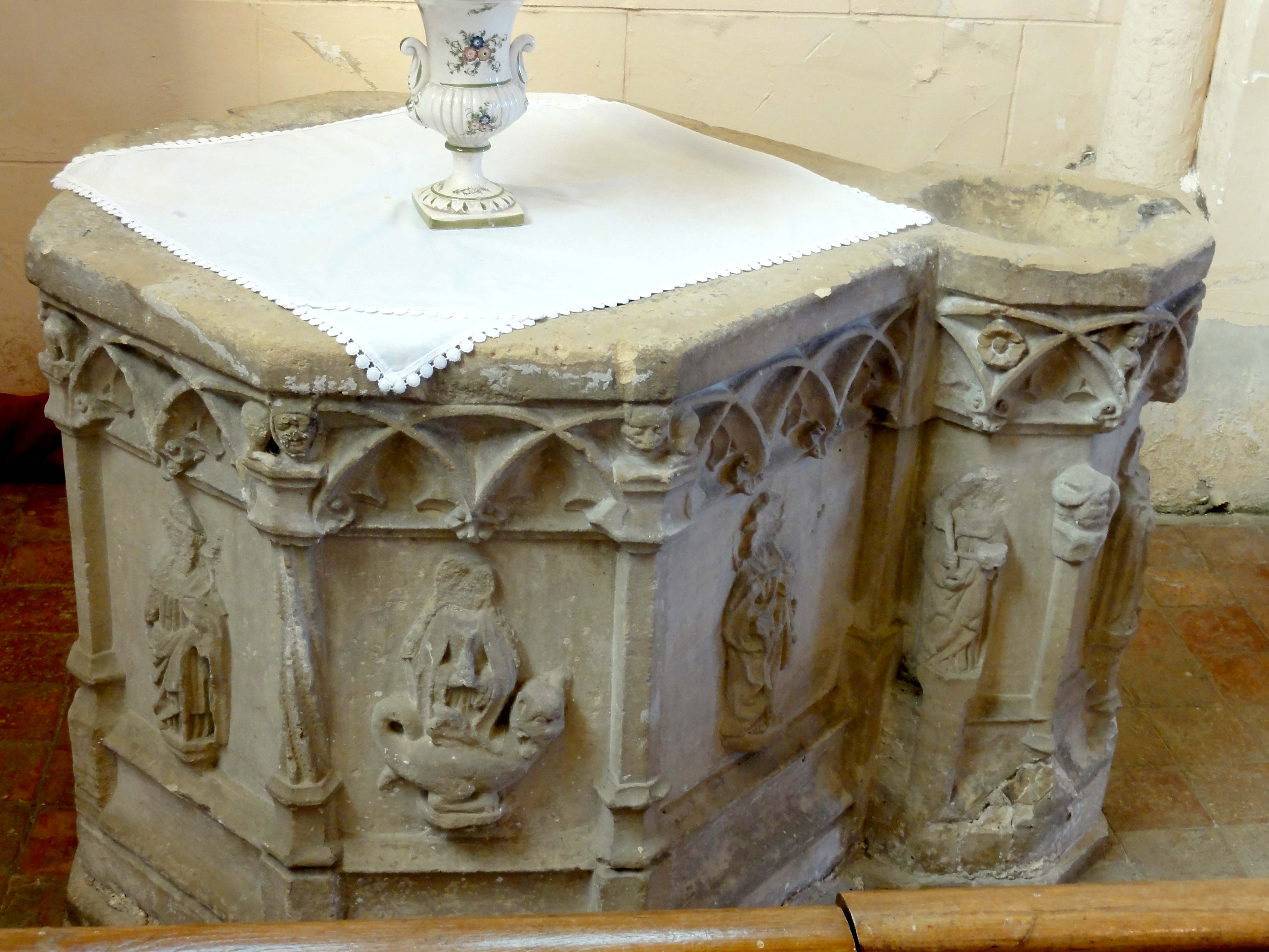 Fonts baptismaux (voir titre).